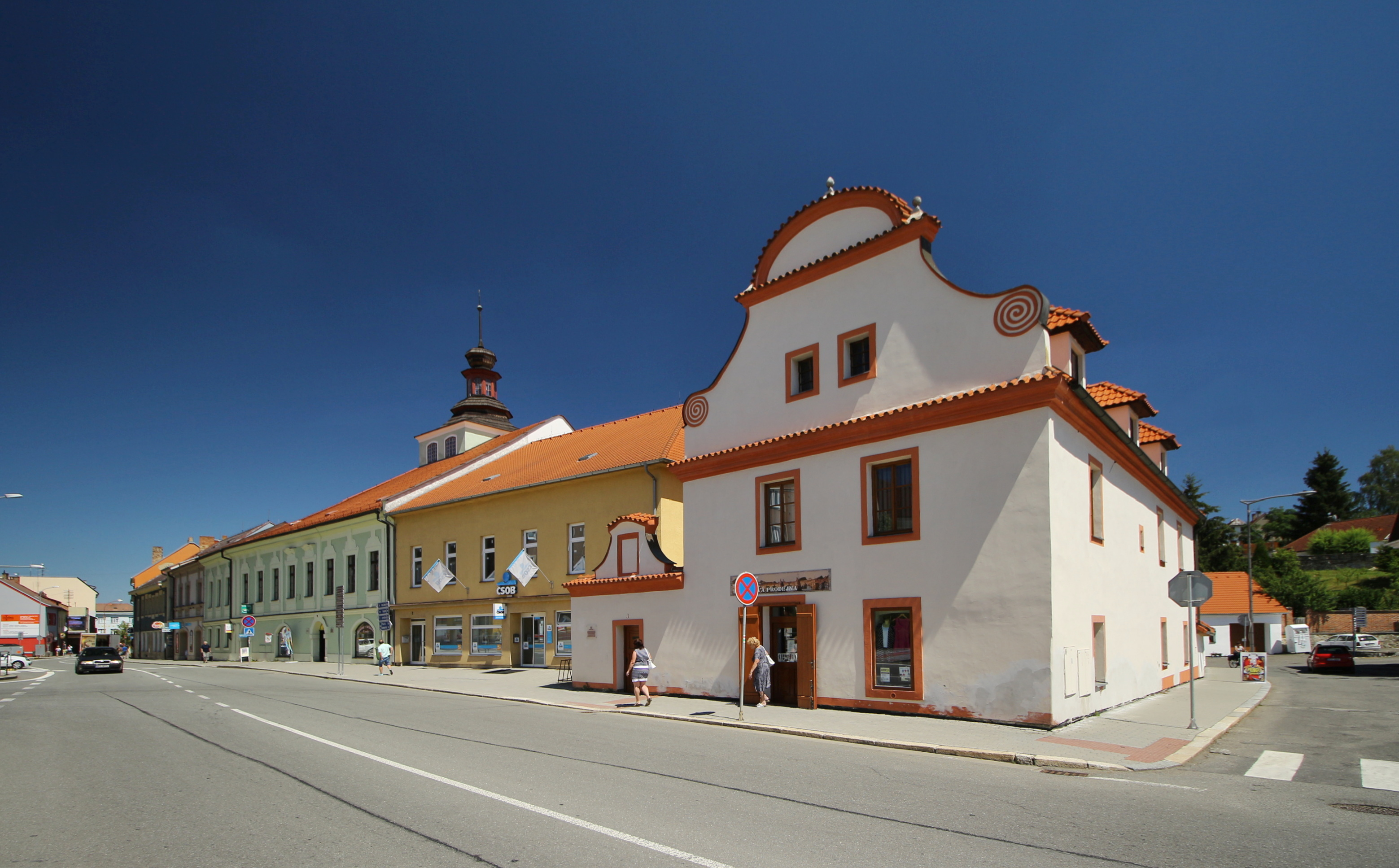 Milevsko náměstí a okolí